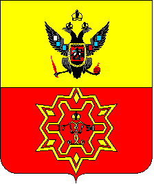 Герб Єлисаветграда періоду Російської імперії. Затверджений 6 квітня 1845 року. У верхній половині перетятого щита в золотому полі Державний Російський герб; у долішній — в червоному полі земляне укріплення, всередині якого вензель Імператриці Єлисавети Петрівни; з боків його 1754 рік.